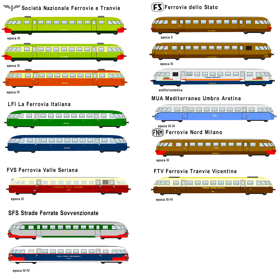 Livree ALn 556/56 e similari autore MARCO LAMBRUSCHI Licensing Categoria:Immagini esclusivamente in GNU FDL